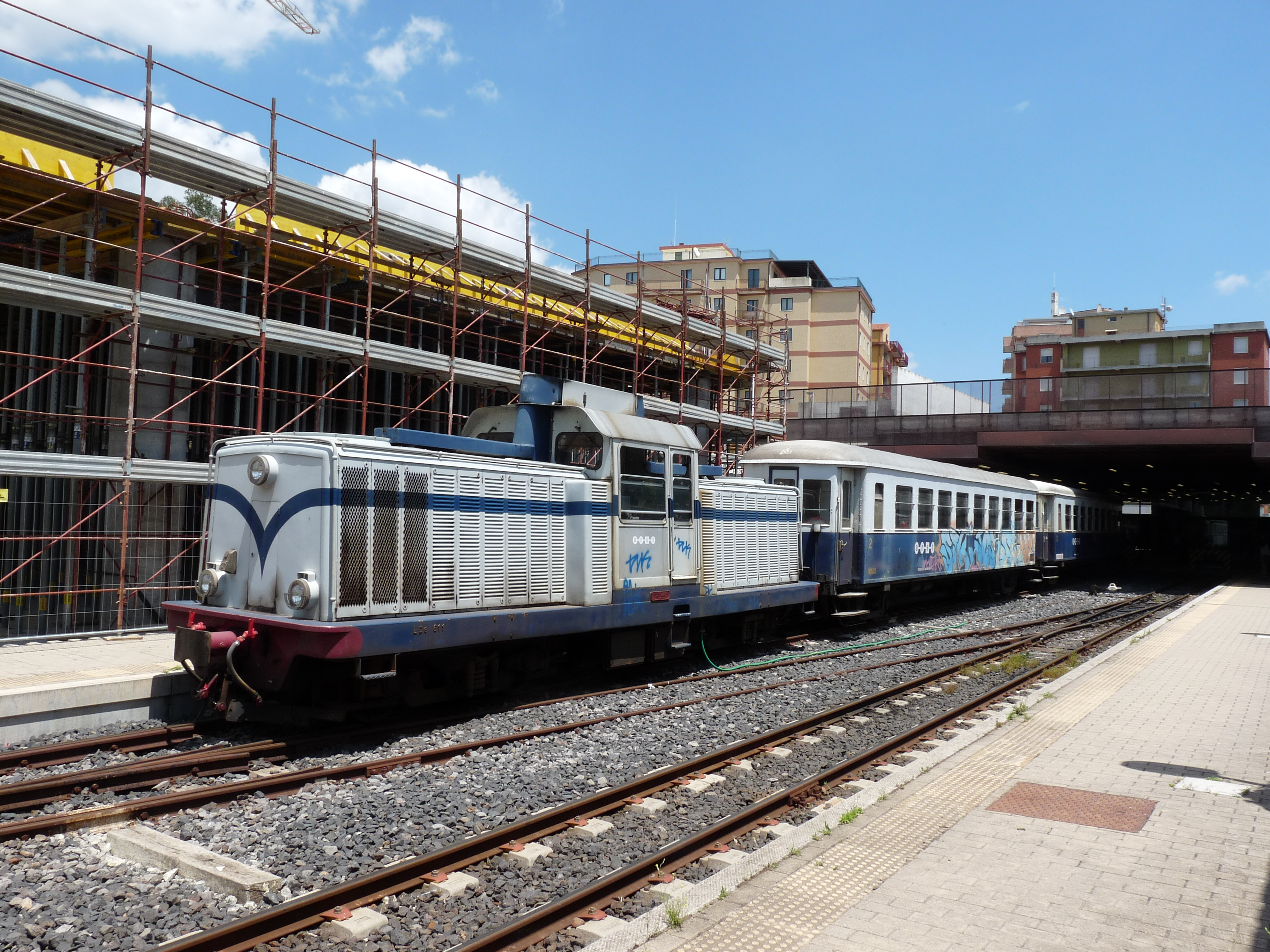 Station Nuoro met excursietrein